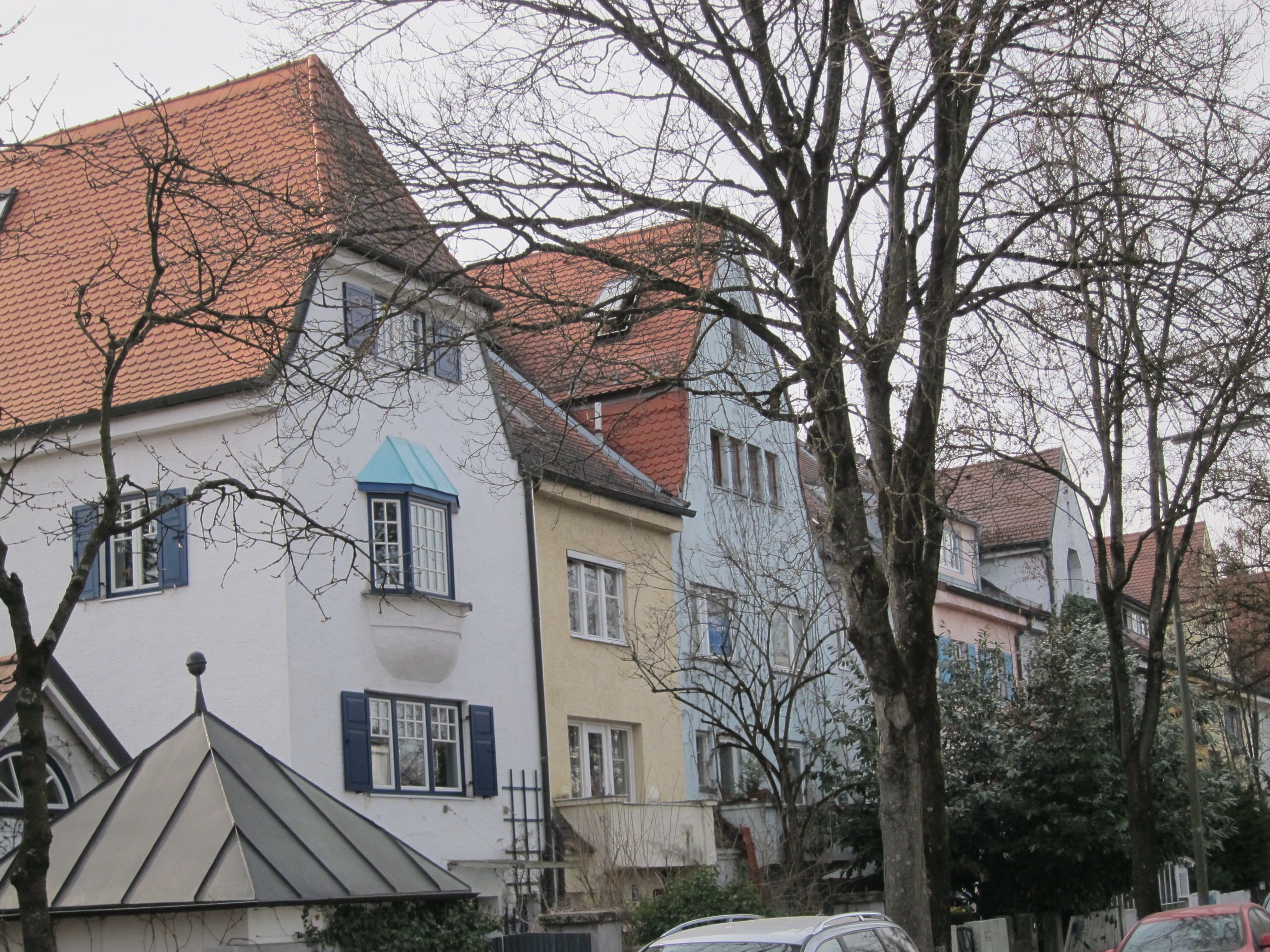 Marschnerstraße 35/37/39/41/41a/41b/41c/41d/41e/41f/41g; Langgestreckte Reihenhausgruppe, 1908–10 von Bernhard Borst.